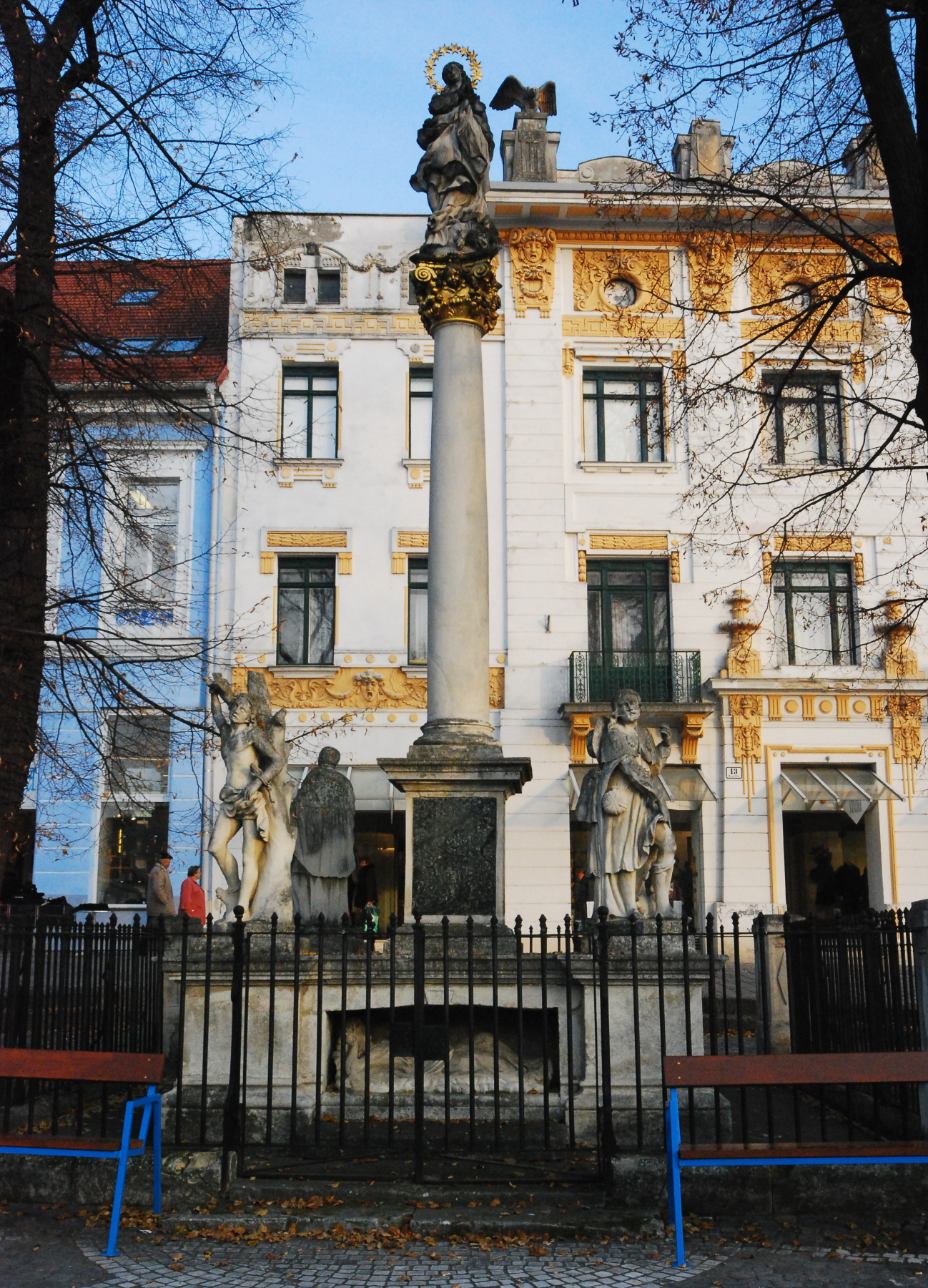 Mariensäule mit Pestheiligen